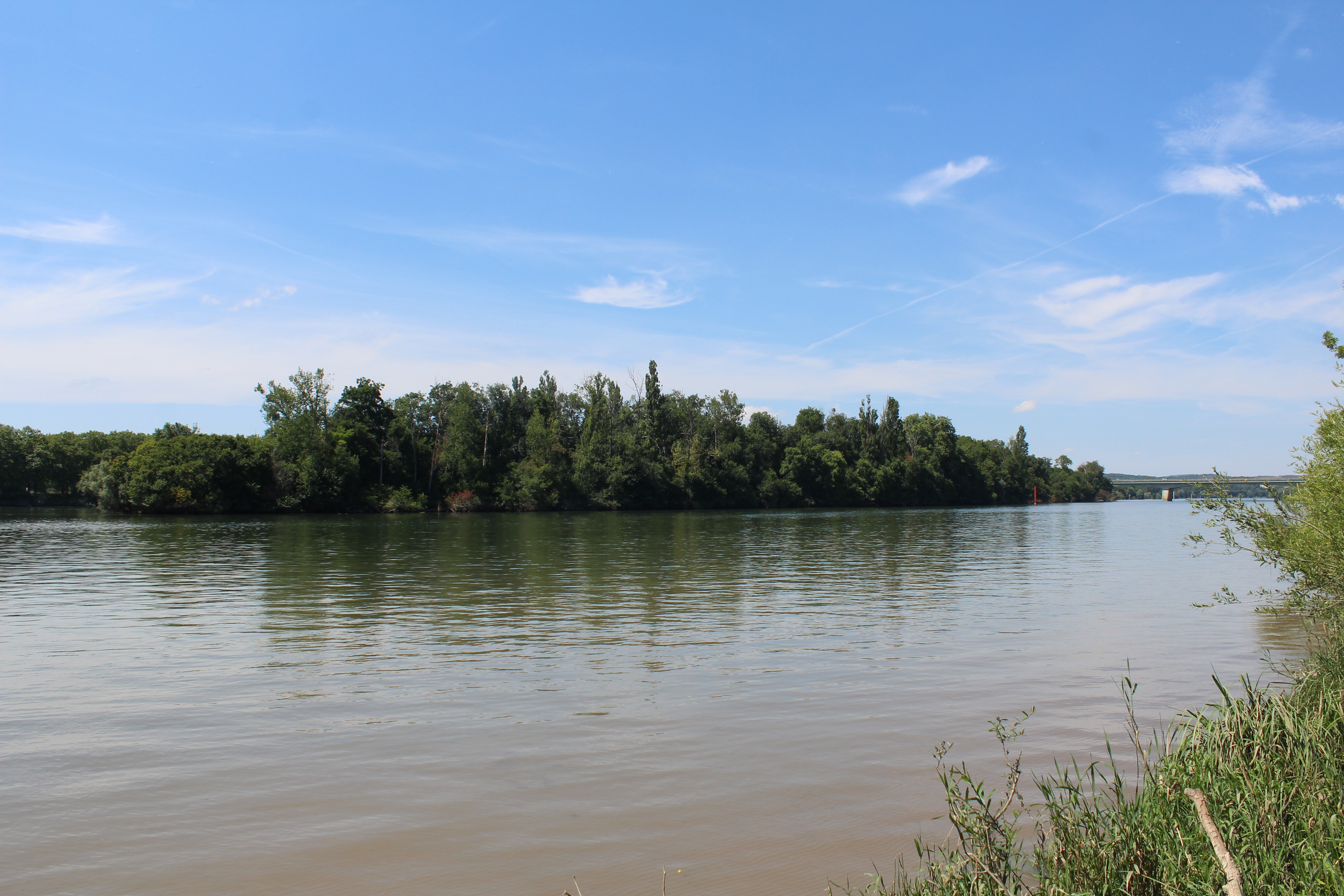 La Saône à Feillens avec l'Île Saint-Jean située à Sancé.